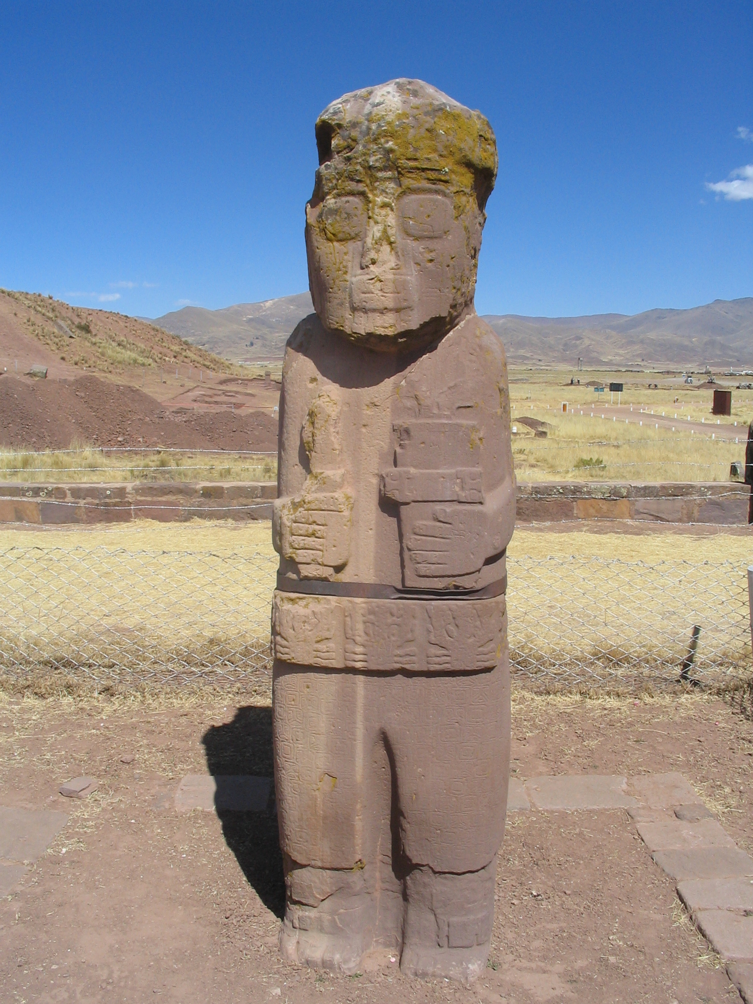 Photo du monolite "El Fraile" de l'ancienne civilisation Tuwanaku en Bolivie. Photo prise par User:Anakin en 2005.